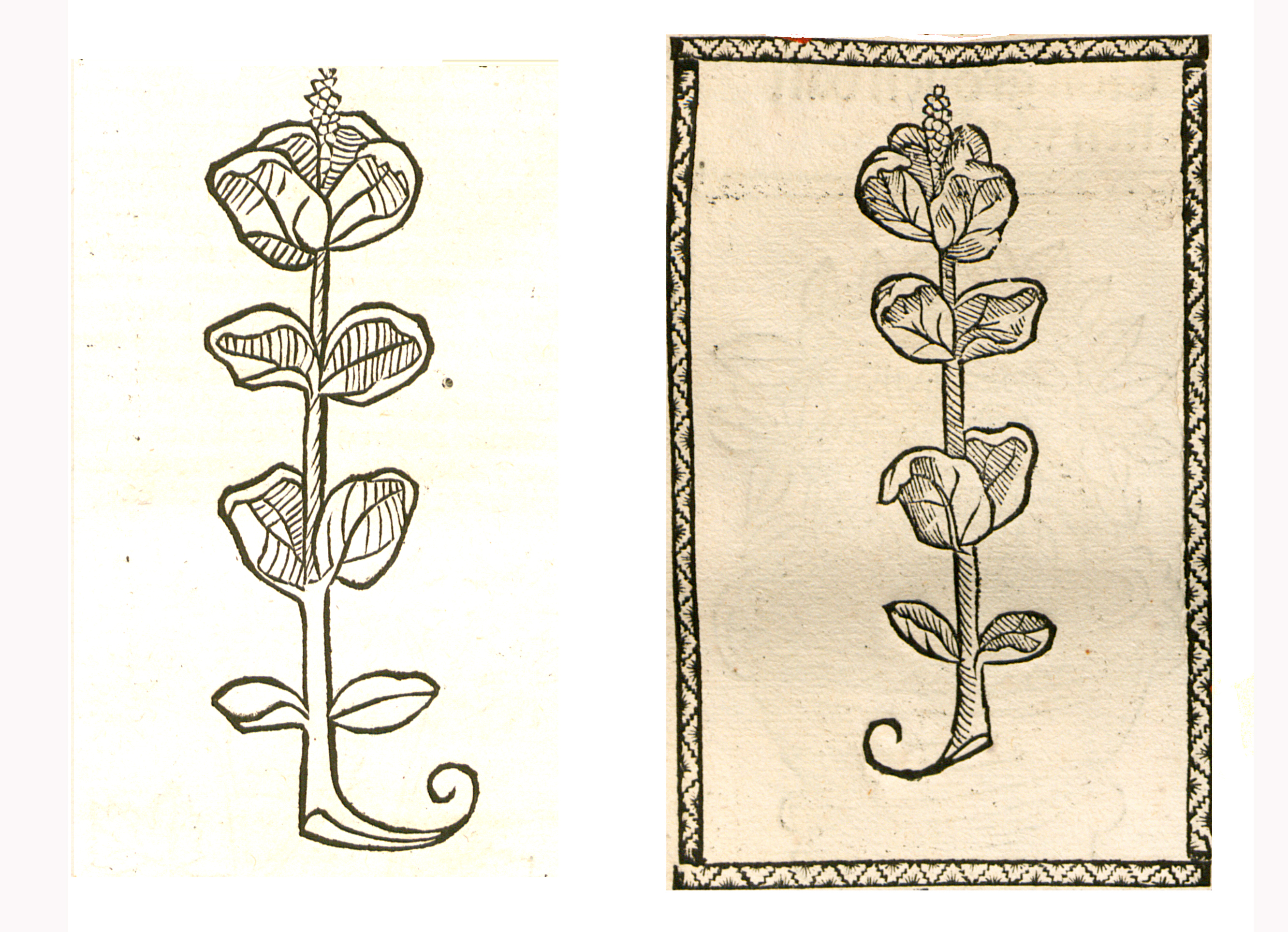 Abbildung von Kruse Basilien